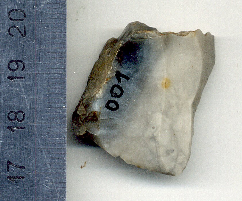 Rdzen